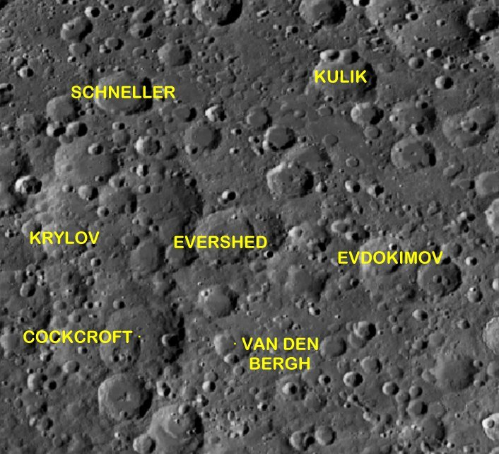 Cráter Eversed. Localización. (Imagen LROC)